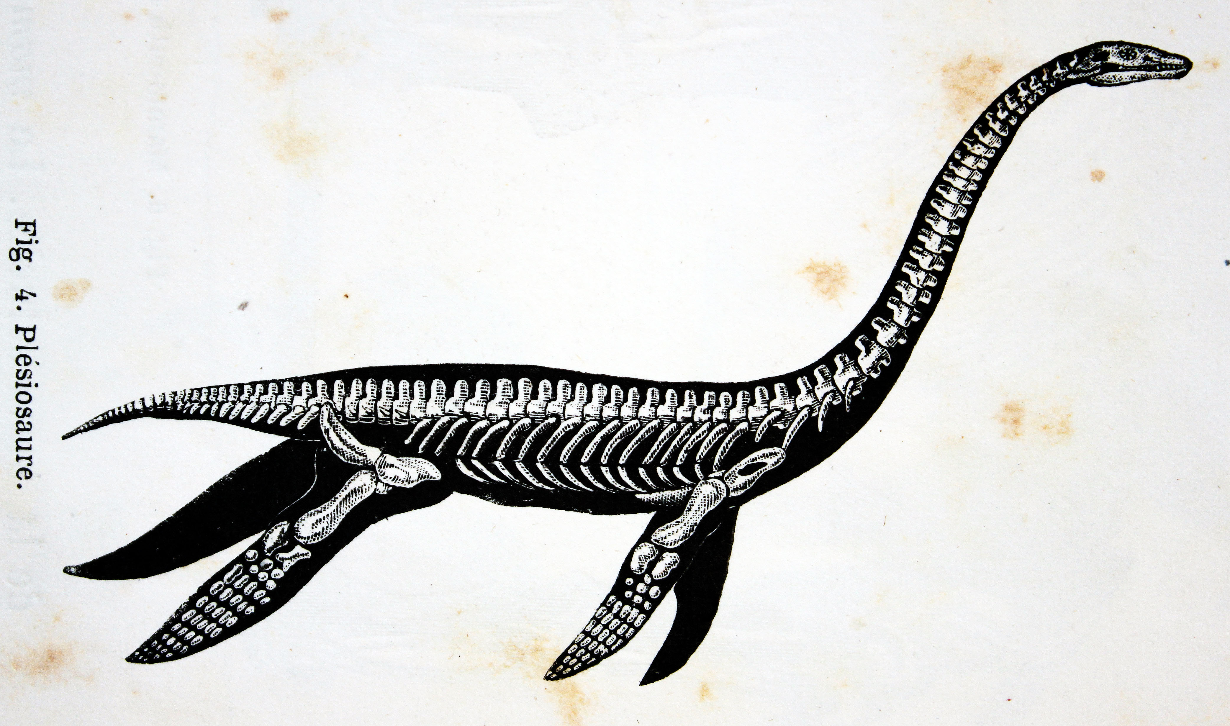 "Plésiosaure". Ilustraciones de la obra : La Terre avant le déluge / par Louis Figuier ; ouvrage contenant 25 vues idéales de paysages de l'Ancien Monde, dessinées par Riou.- Paris : Librairie de L. Hachette, 1863. - 2e éd.